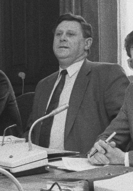 Collectie / Archief : Fotocollectie Anefo Reportage / Serie : [ onbekend ] Beschrijving : Commissie Visserijfraude begint betrokkenen te horen: vlnr Tienstra, Kamerleden Wim Keja, Jan Nijland, Aad Kosto Datum : 11 februari 1987 Trefwoorden : KAMERLEDEN, commissies, ministers Persoonsnaam : Keja, Wim, Kosto, Aad, Nijland, Jan Fotograaf : Croes, Rob C. / Anefo, [onbekend] Auteursrechthebbende : Nationaal Archief Materiaalsoort : Negatief (zwart/wit) Nummer archiefinventaris : bekijk toegang 2.24.01.05 Bestanddeelnummer : 933-8877